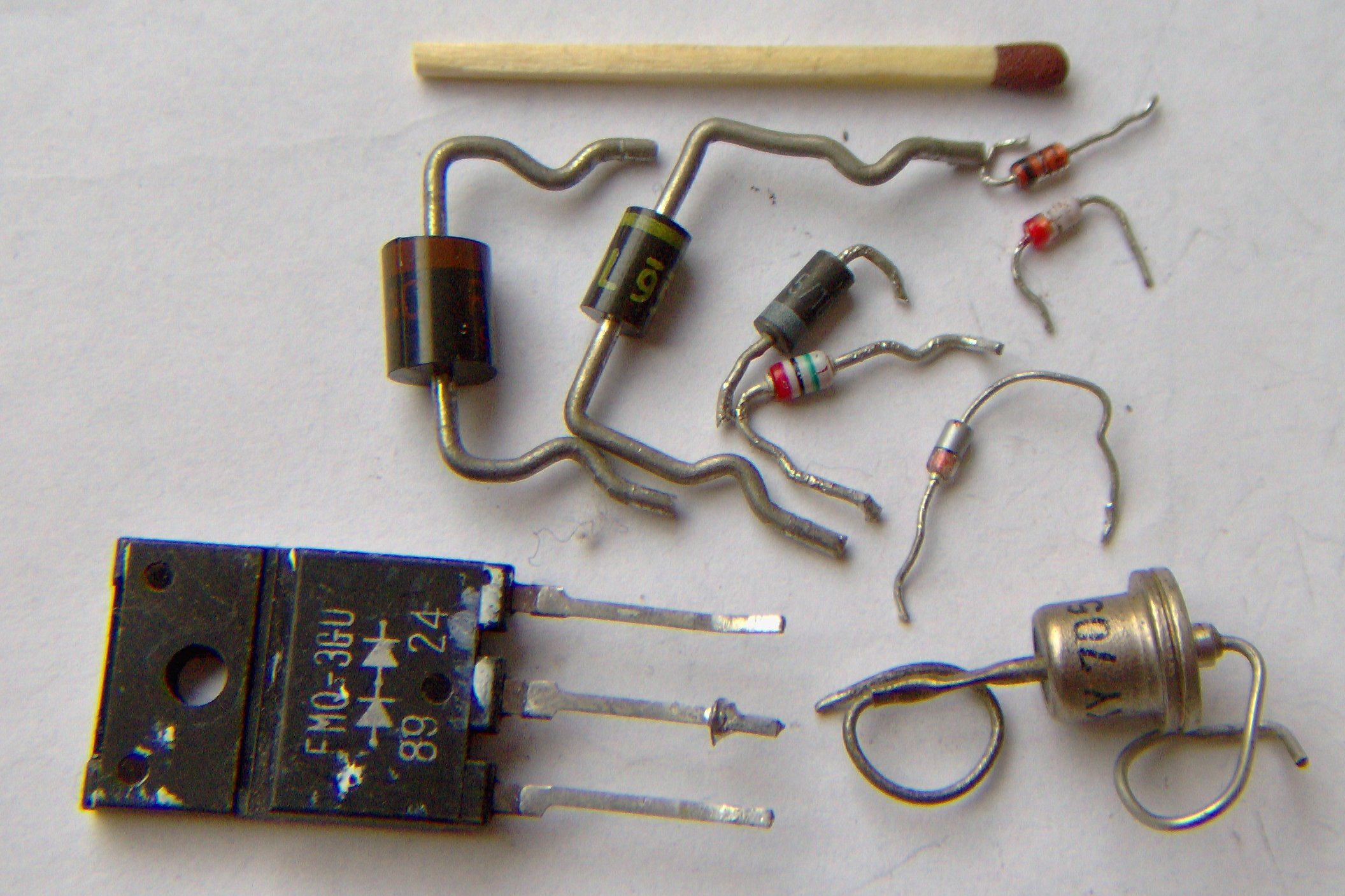 Electronic component - diodes